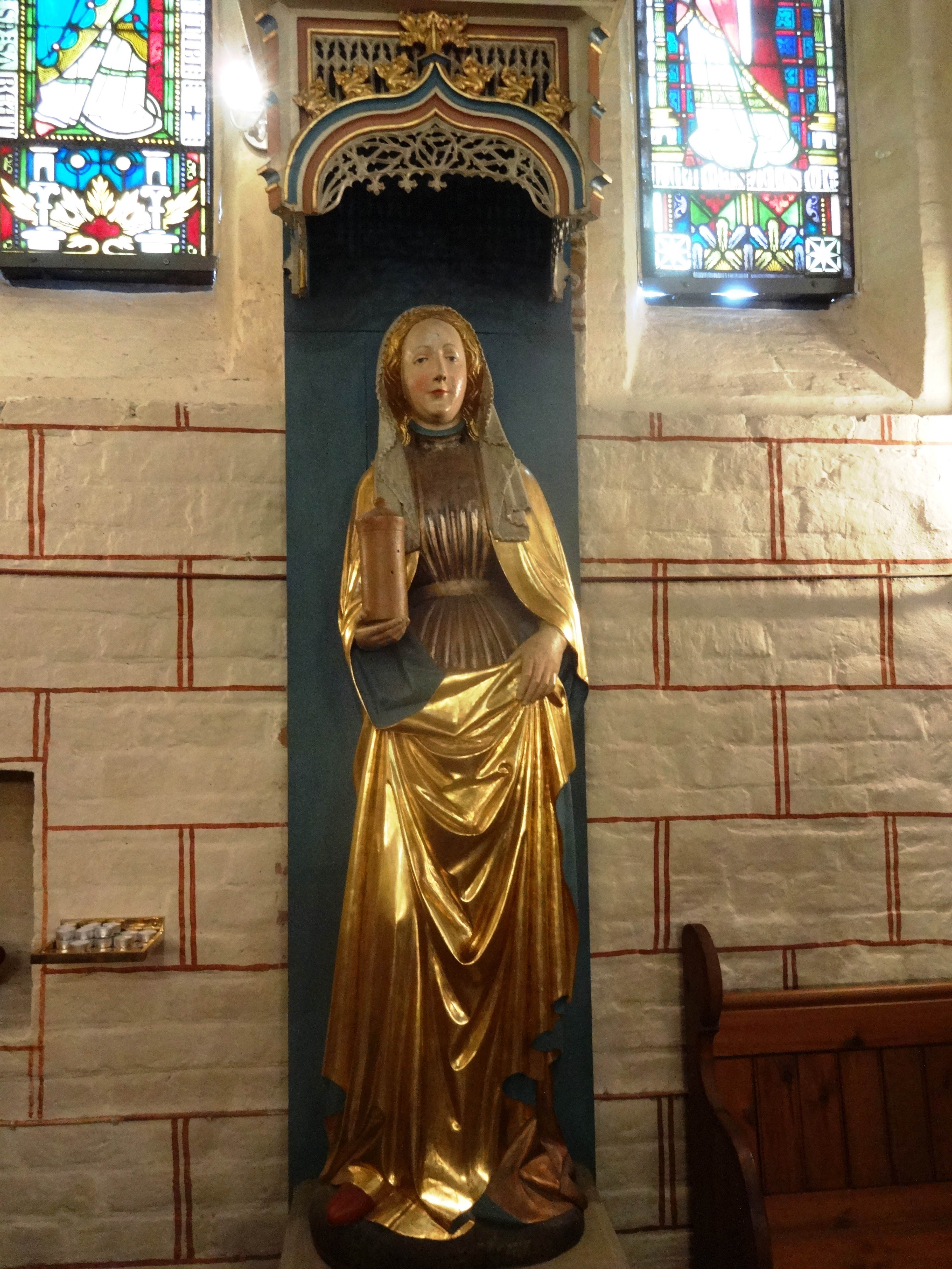 Maria-Magdalena-Statue, Berkenthin, ca. 15. Jh.